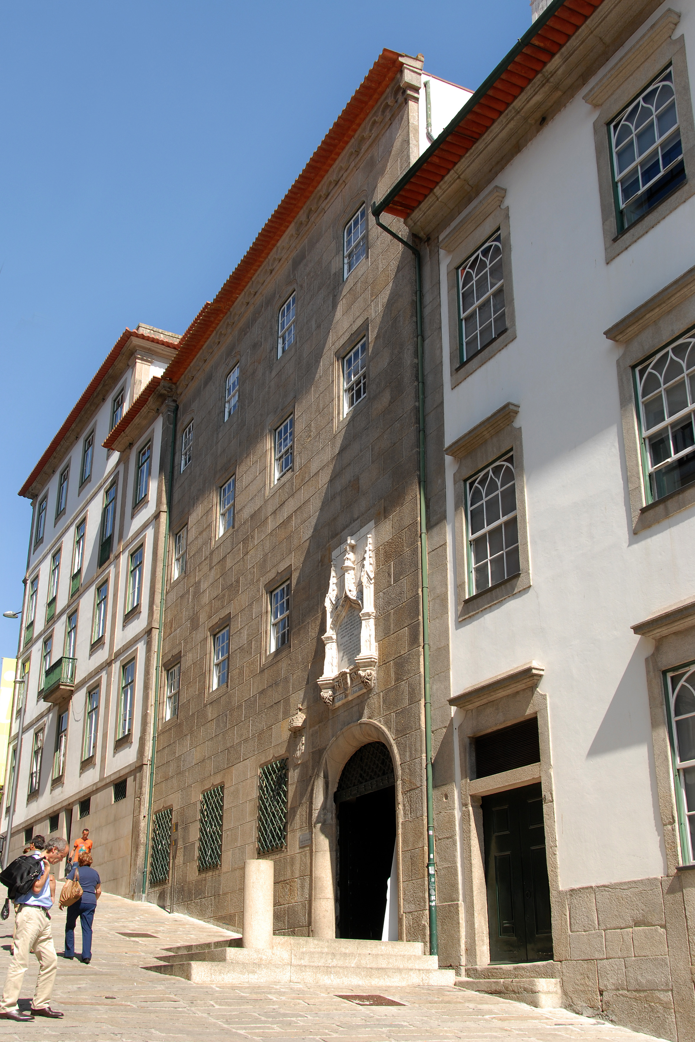 Casa da Rua da Alfândega Velha ou Casa do Infante This file was uploaded for Wiki Loves Monuments in Portugal with the unique identifier 70201.